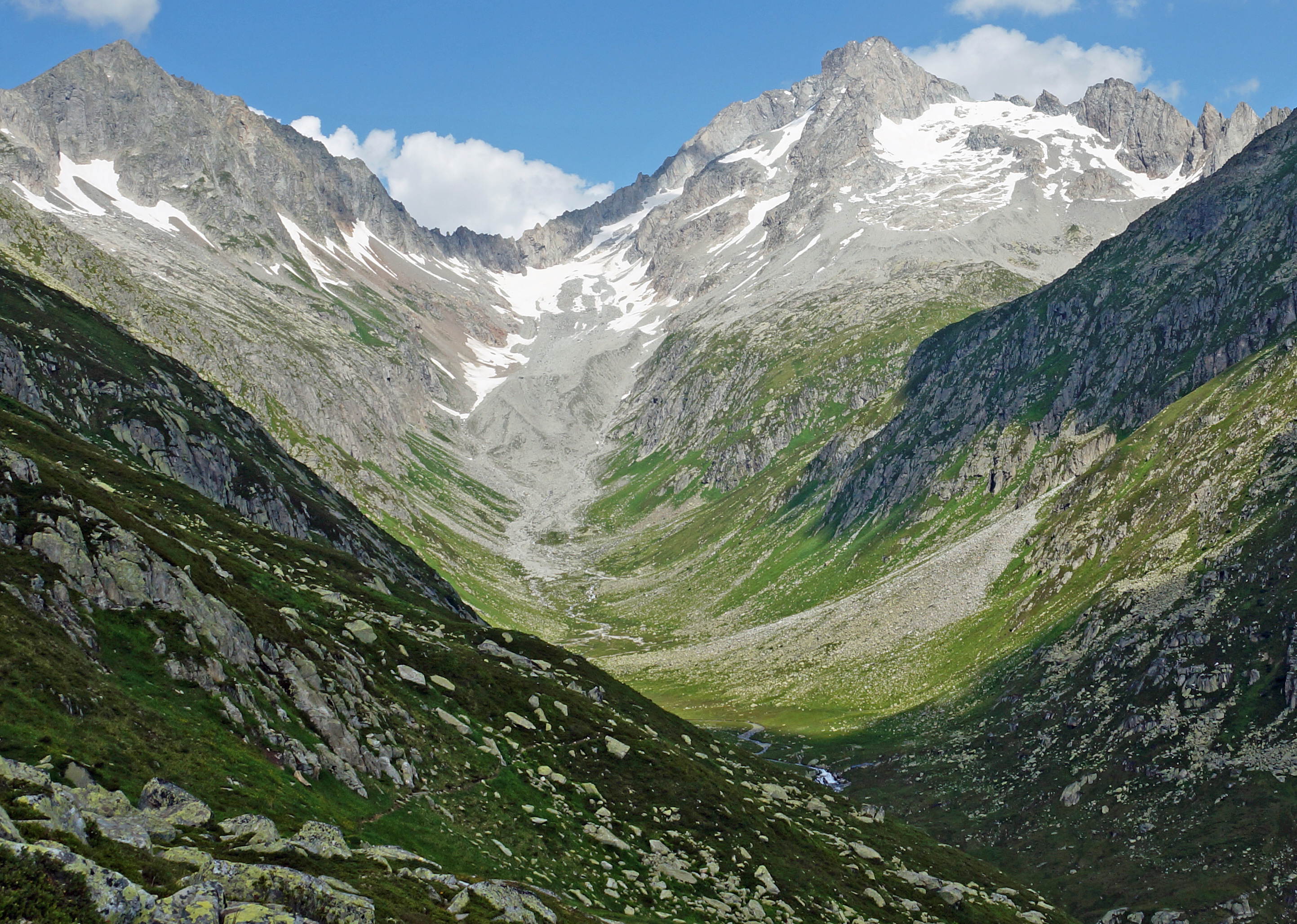 Obere Val Strem – links Witenalpstock (P. 3007), Mitte Oberalplücke (2760m), rechts Oberalpstock (P. 3295)